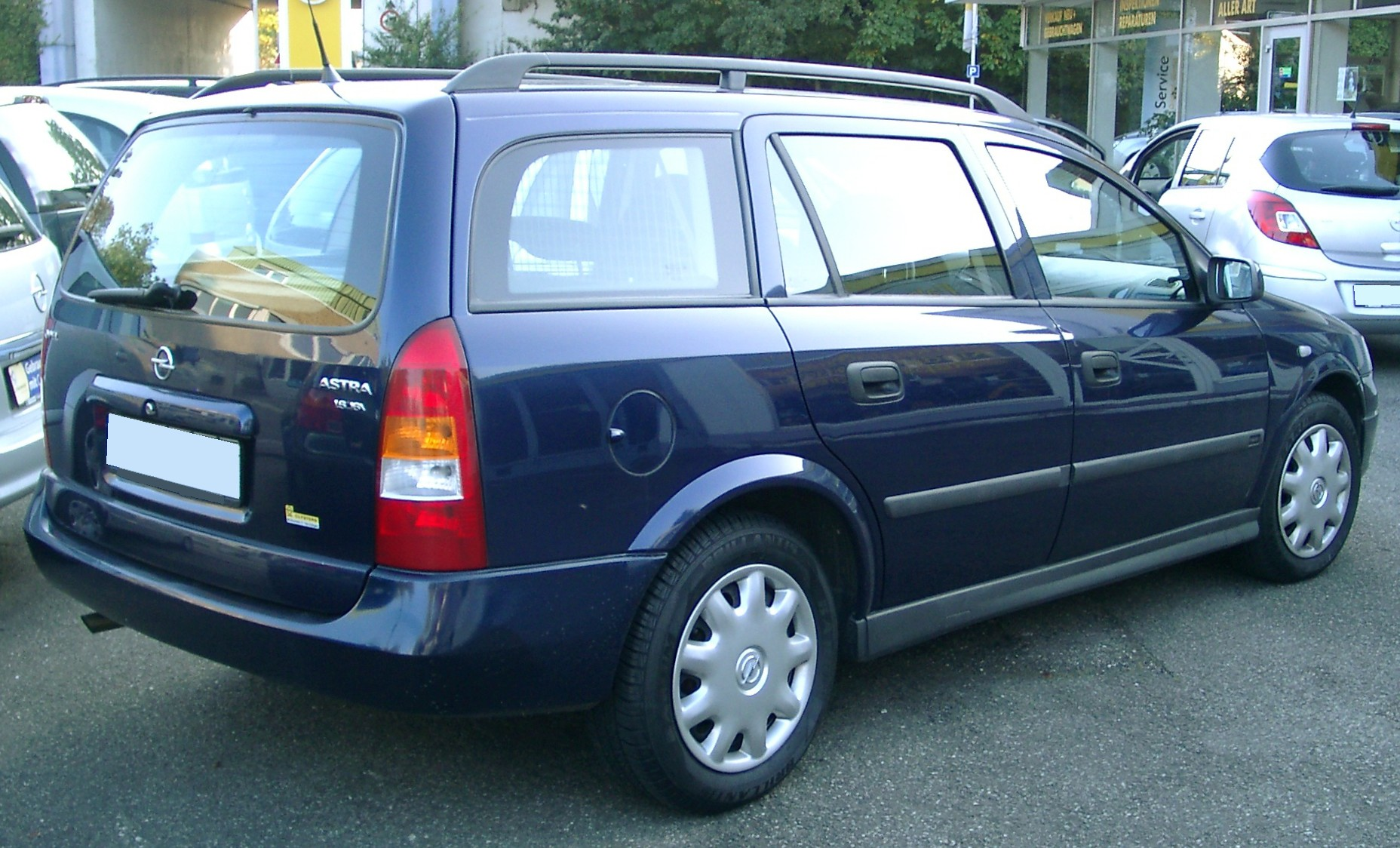 Opel Astra G Caravan